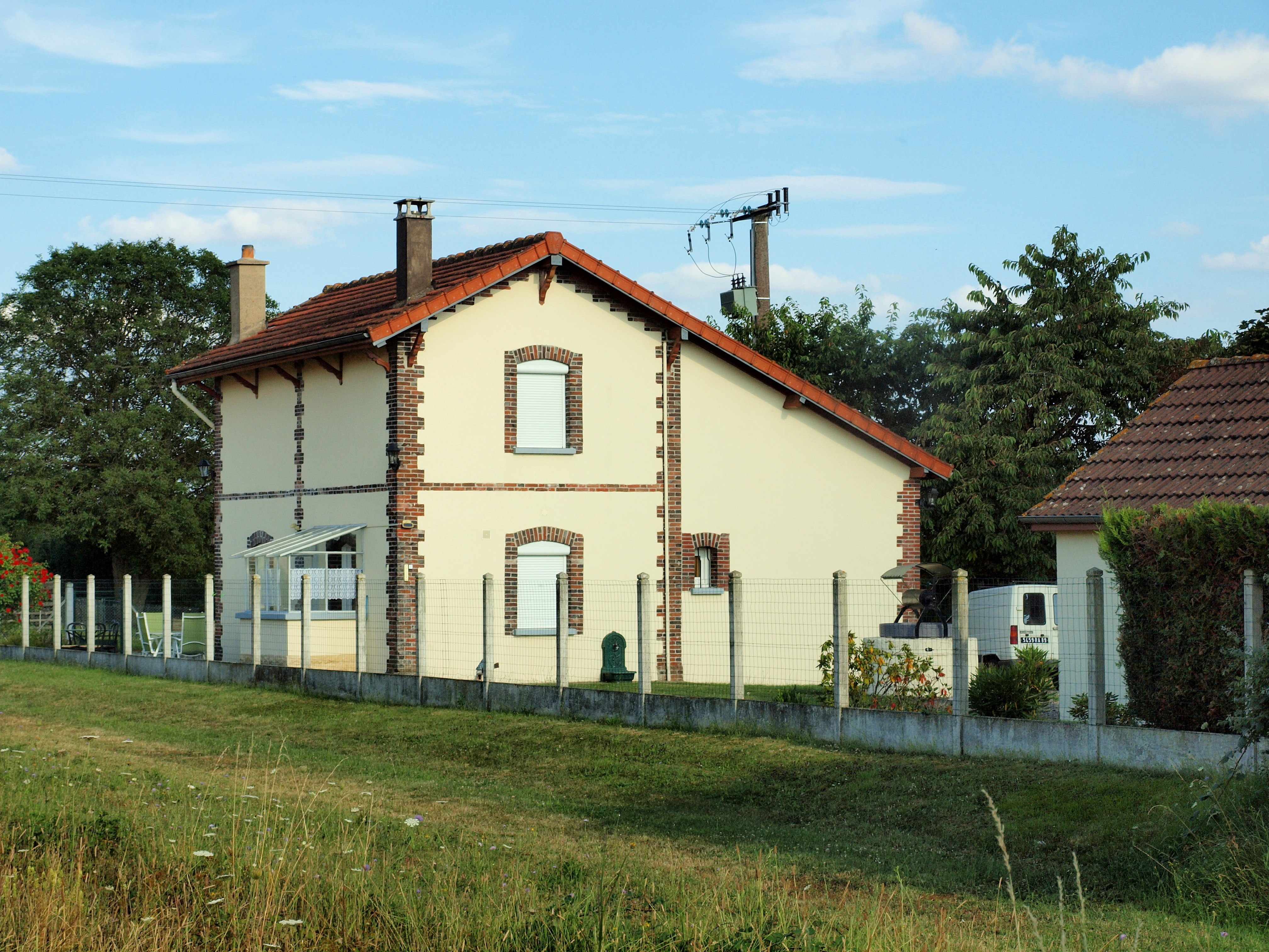 Malay-le-Petit (Yonne, France)